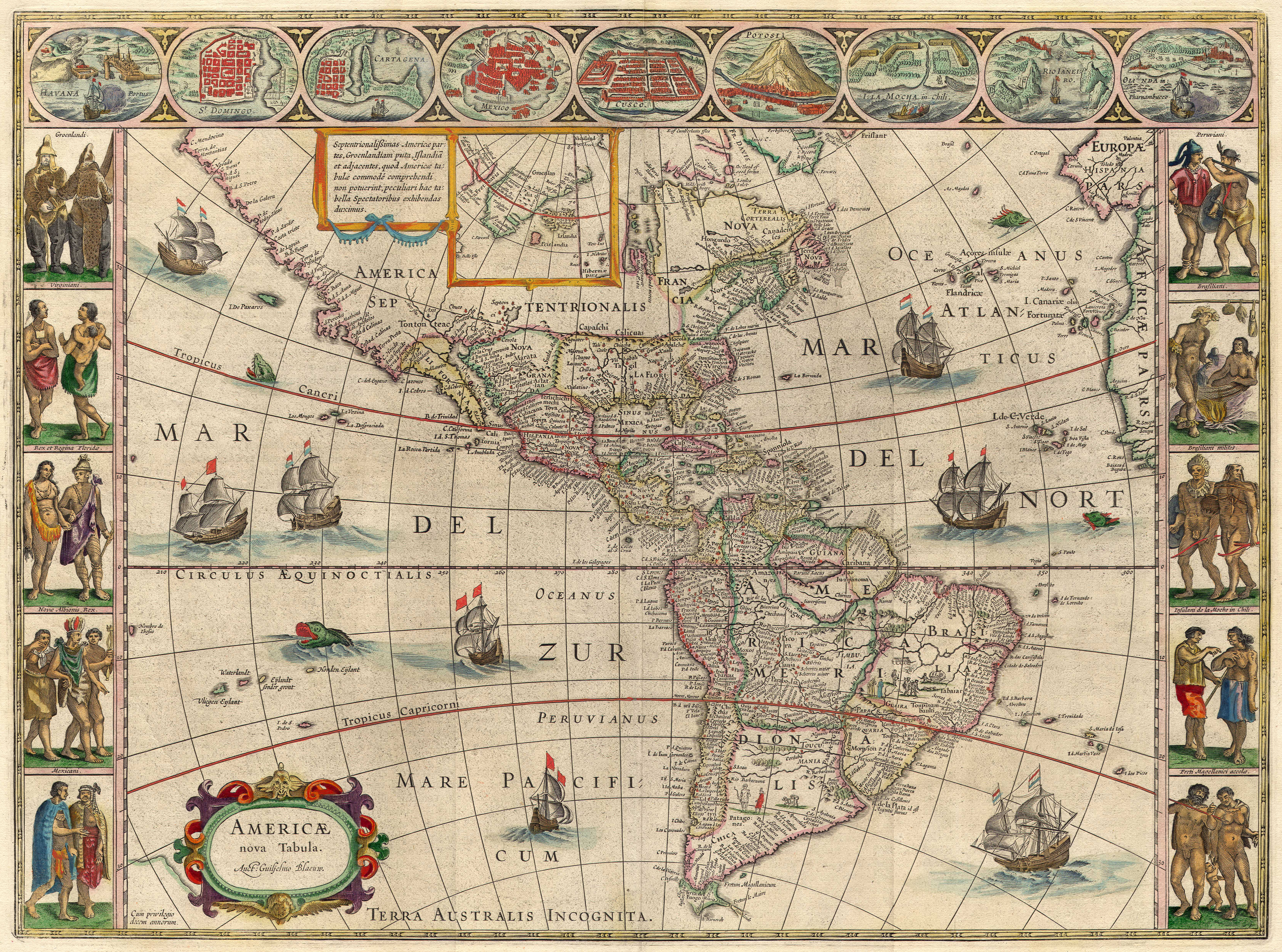 Americæ nova Tabula; Nieuwe kaart van Amerika